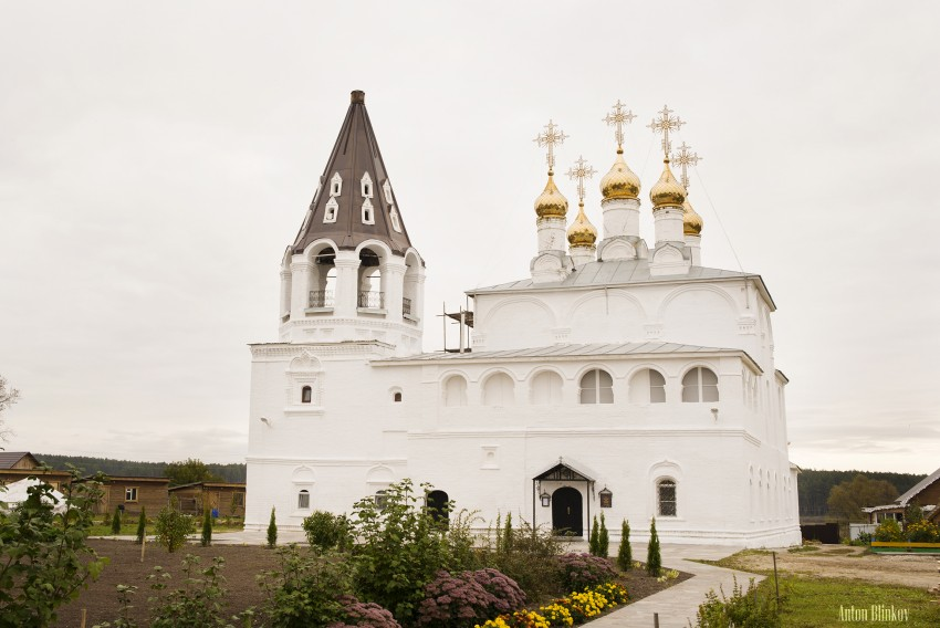 Façade du monastère Borissoglebski